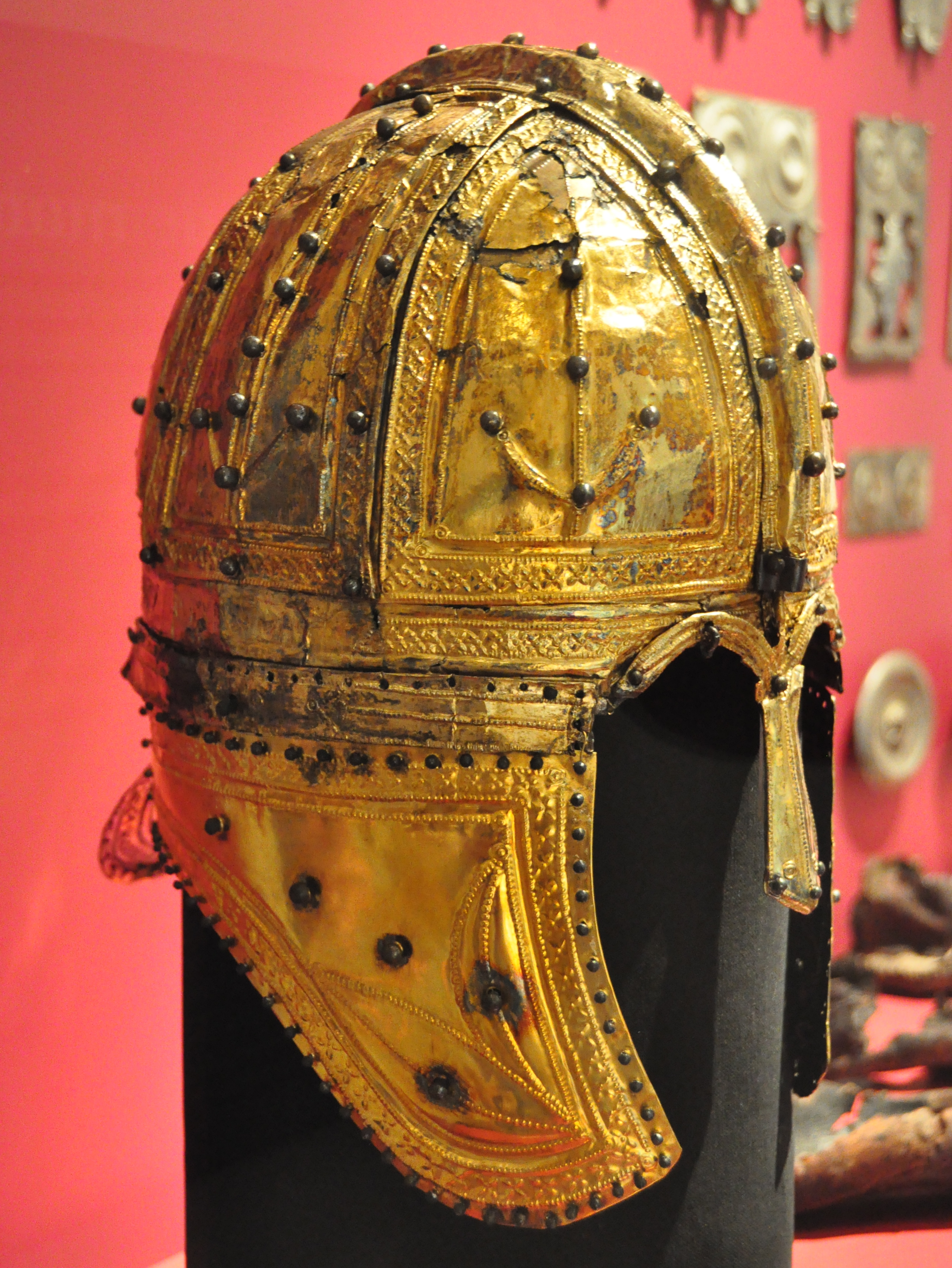 Wiki loves art project